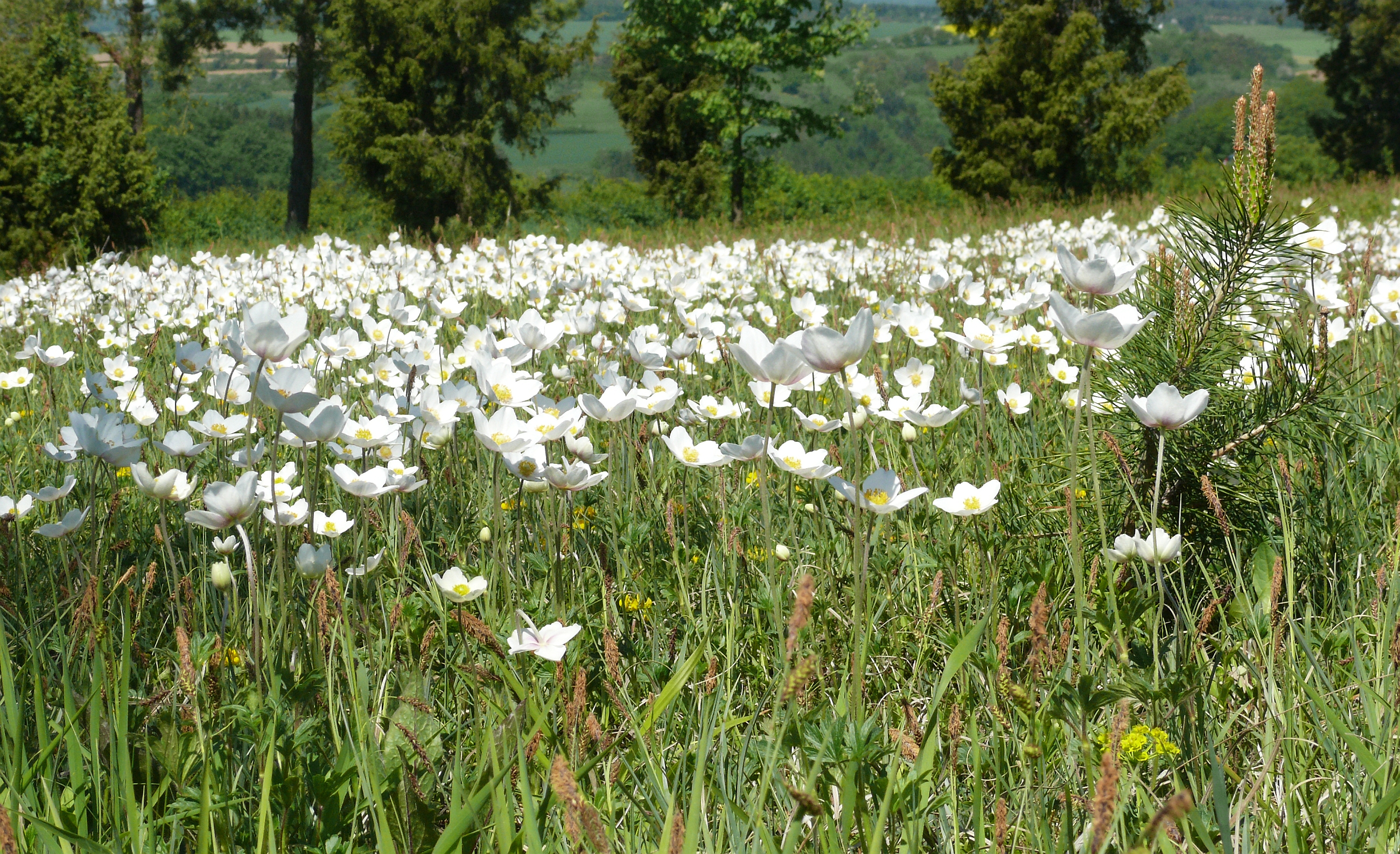 Anemone sylvestrisTaubergrund, Baden-Württemberg, Deutschland